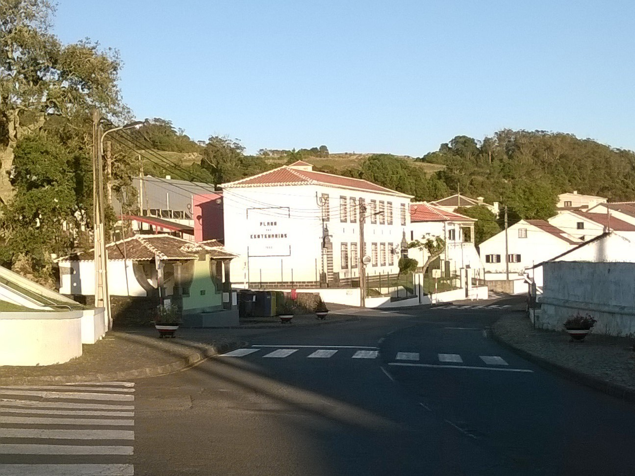 Antiga escola pública do "Plano dos Centenários", freguesia de Posto Santo, concelho de Angra do Heroísmo, ilha Terceira, Região Autónoma dos Açores, Portugal